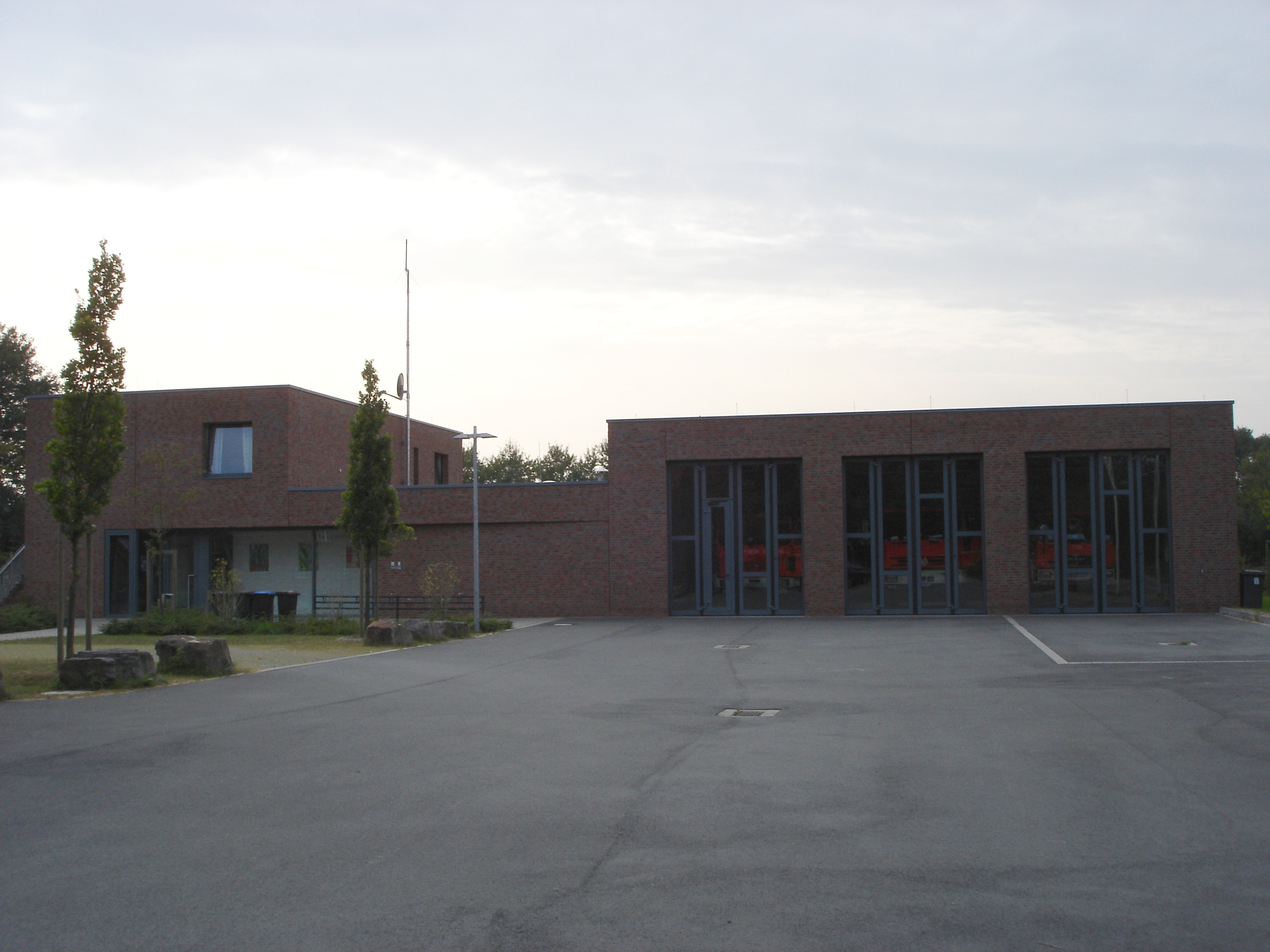 Gerätehaus der Feuerwehrzuges Werse-Laer, Münster, Deutschland